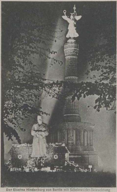 Eisener HIndenburg